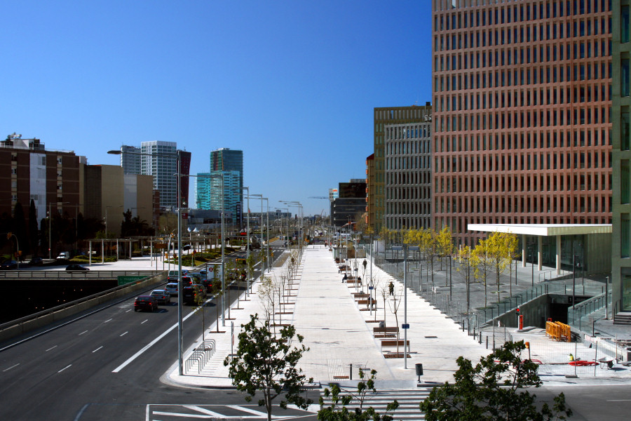 Ciutat de la Justicia i Gran Via de les Corts Catalanes